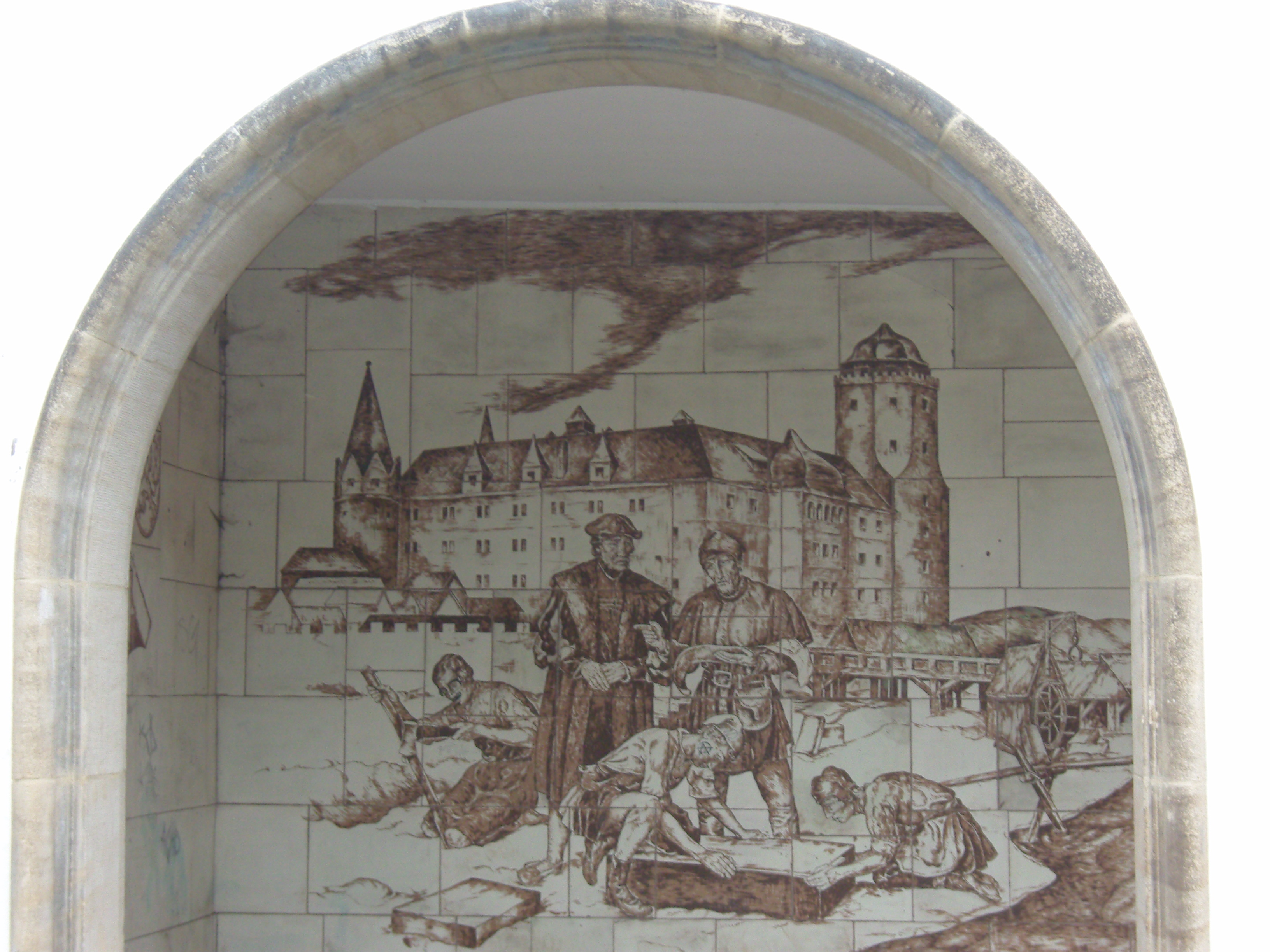 Ausschnitt eines Sgraffitos an der Augustusbrücke von Hans Nadler, Dargestellt ist der Bau des Dresdner Residenzschlosses